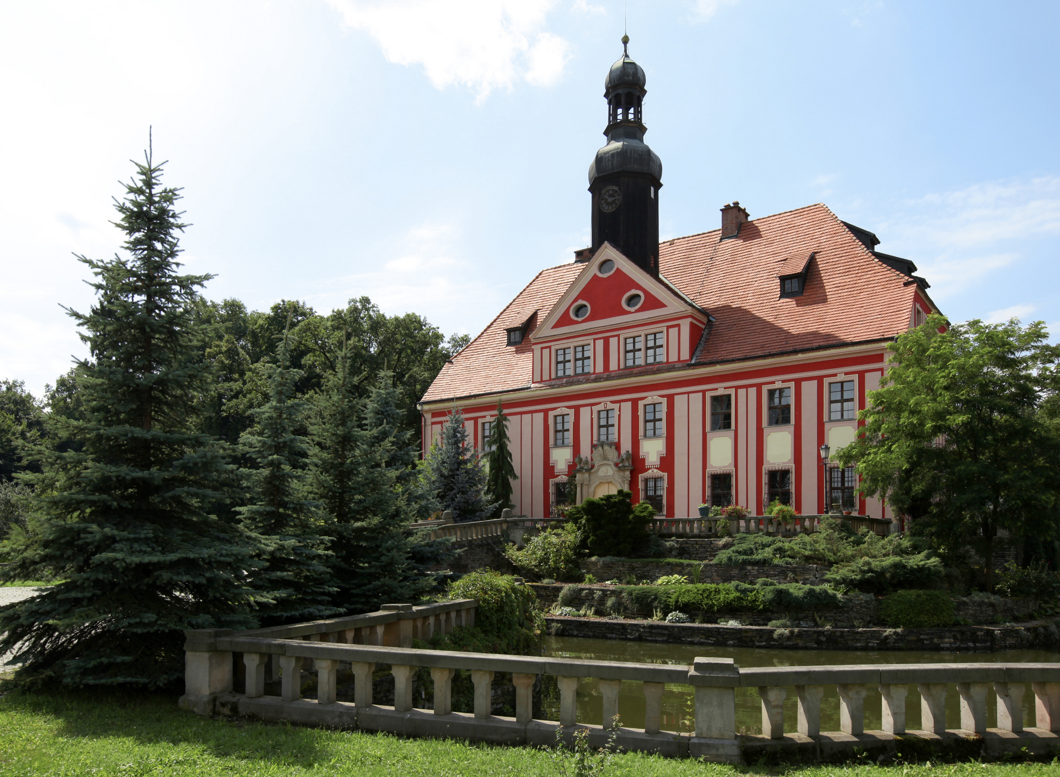 Warmątowice Sienkiewiczowskie, pałac, XVII, 1748